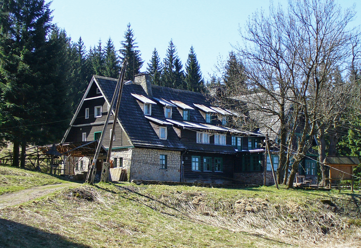 Baude im Habelschwerdter Gebirge (polnisch: Góry Bystrzyckie): Schronisko Pod Muflonem (wörtlich Baude "Unter dem Mufflon"), früher Baude "Stille Liebe" (Cicha Miłość) über Bad Reinerz (Duszniki-Zdrój), Niederschlesien, Polen.